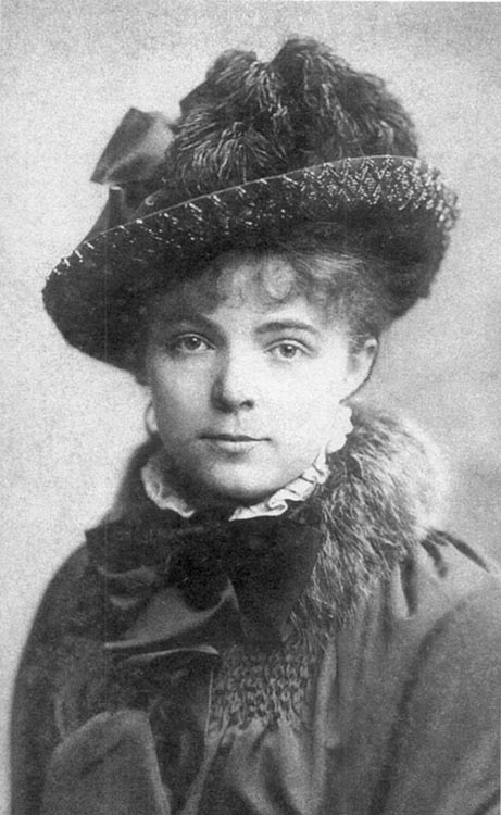 Marie Bashkirtseff